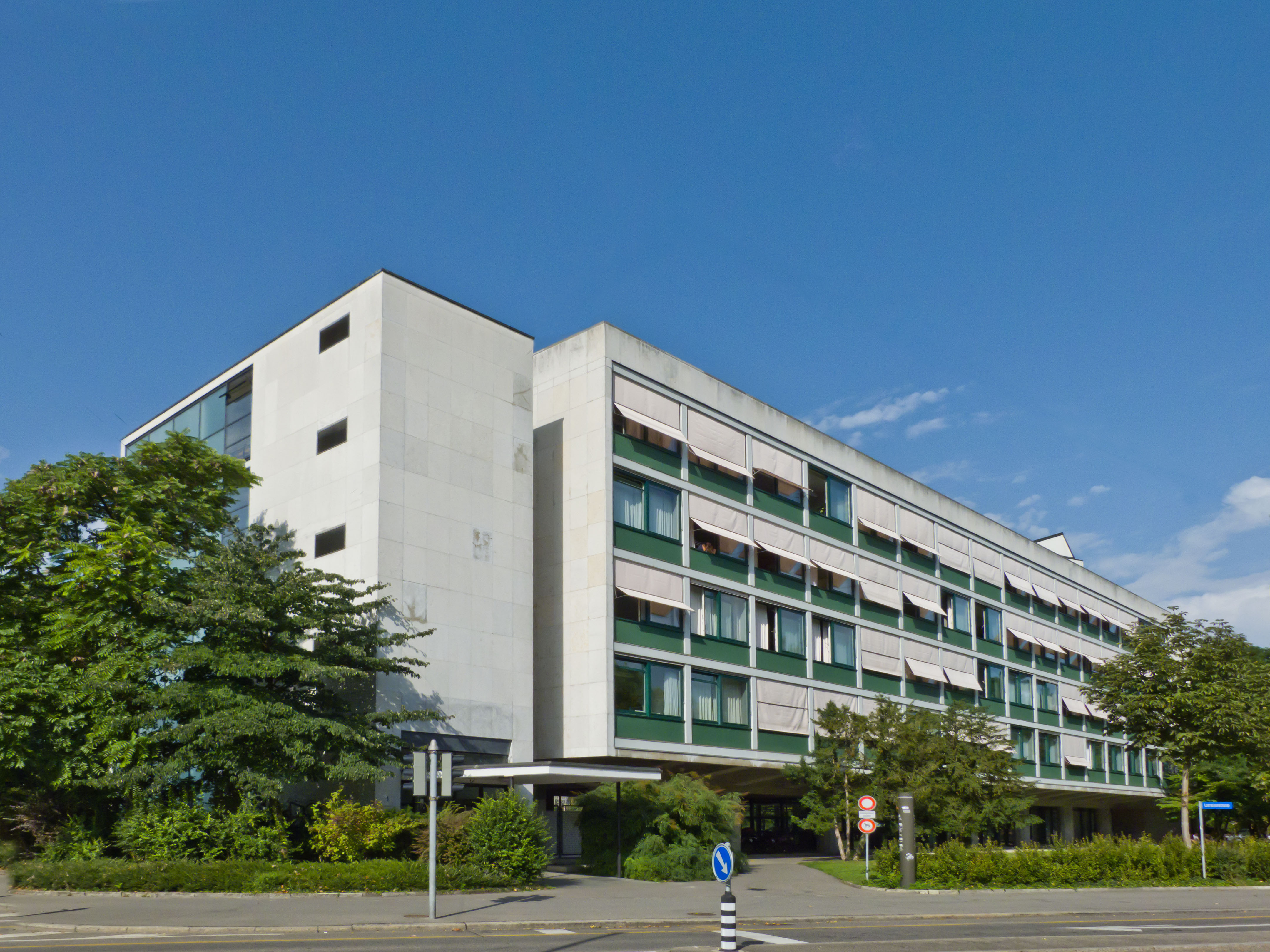 Gewerbeschule Bern, erbaut von Architekt Hans Brechbühler 1937-1939. Architektur "Neue Sachlichkeit"